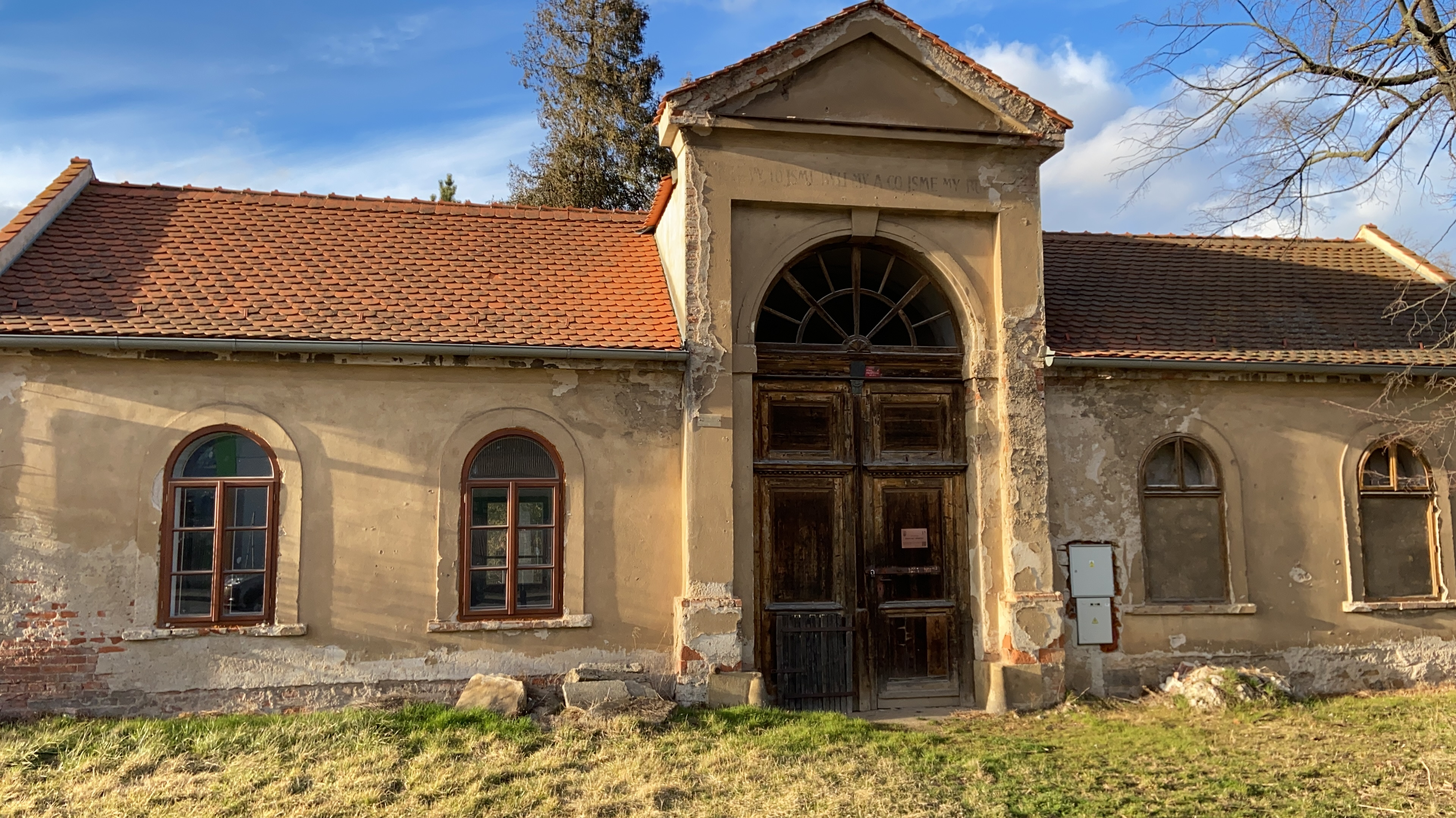 Der Friedhof war zur Zeit der Aufnahme nicht zugänglich.